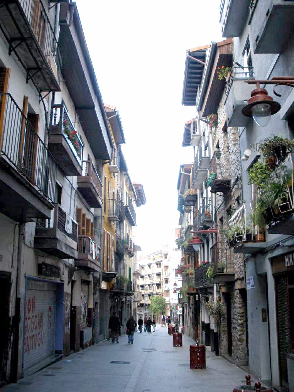 Hernani (Gipúzkoa)